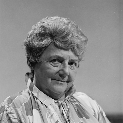 Mieke Verstraete als Mevrouw Welling in de Nederlandse dramaserie Man alleen in 1981